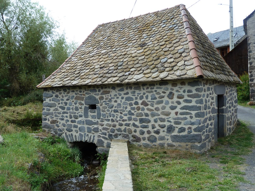 Moulin à Cézerat, Vernols, Cantal, France